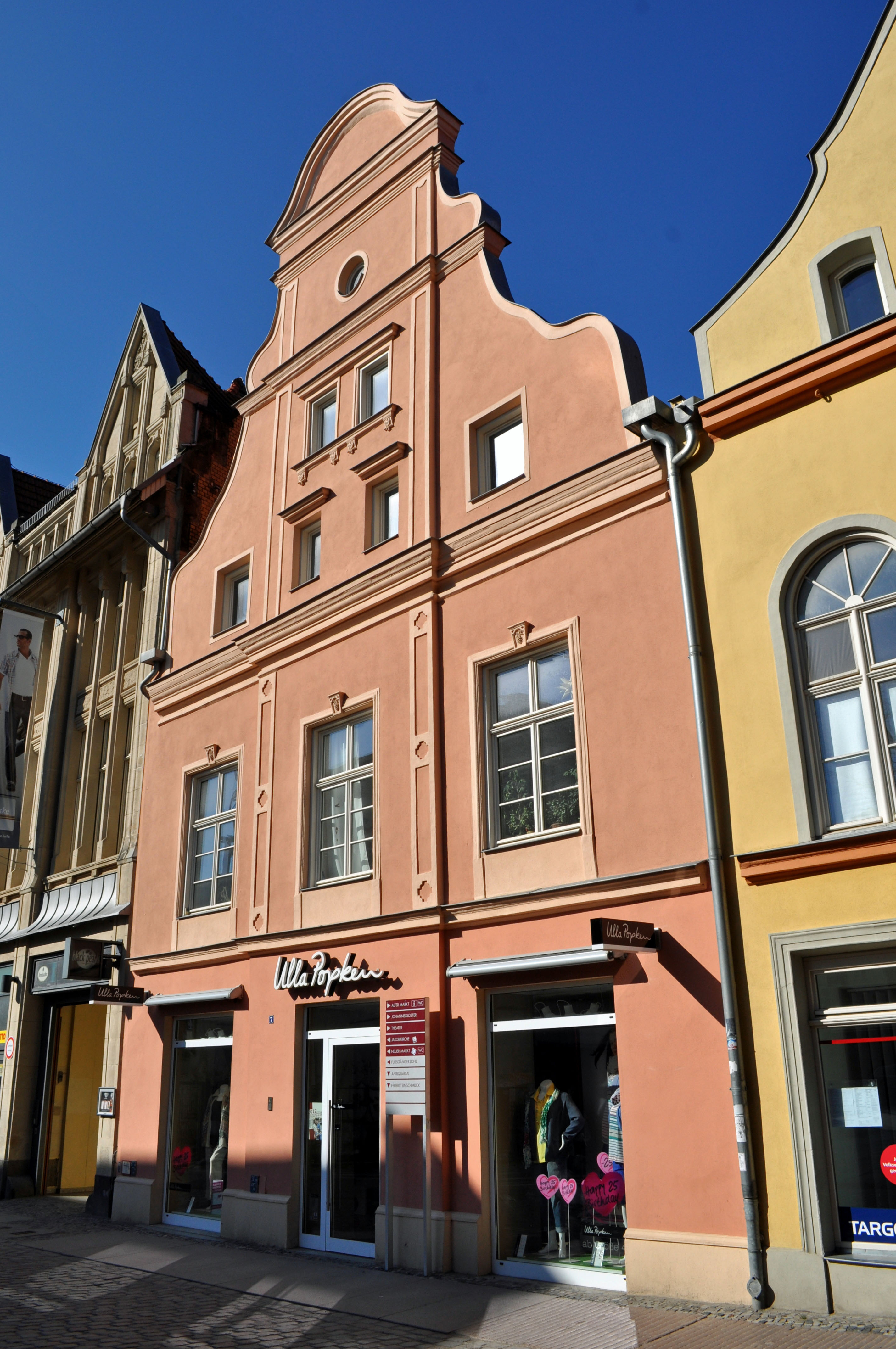 Gebäude bzw. Gebäudedetail in Stralsund. Straße und Hausnummer siehe Dateiname.